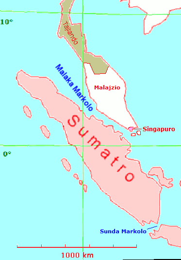 Malaka Markolo inter Sumatro kaj la Malaka Duoninsulo. Mapo kreita per GIMP je 2004-21-31.